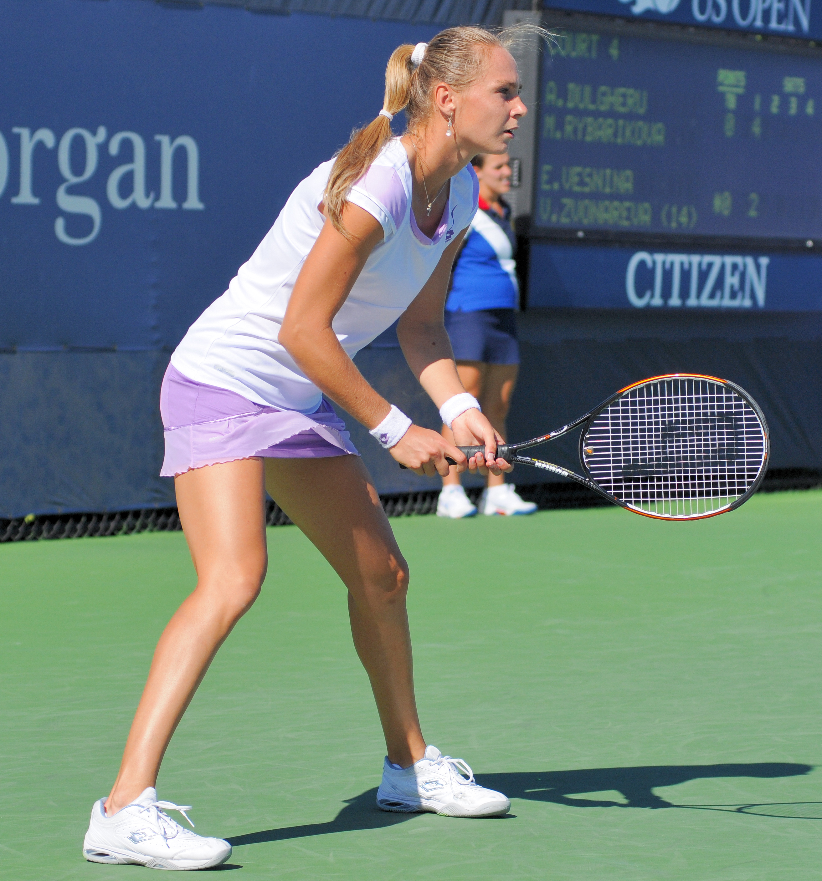 Magdaléna Rybáriková - US Open 2010